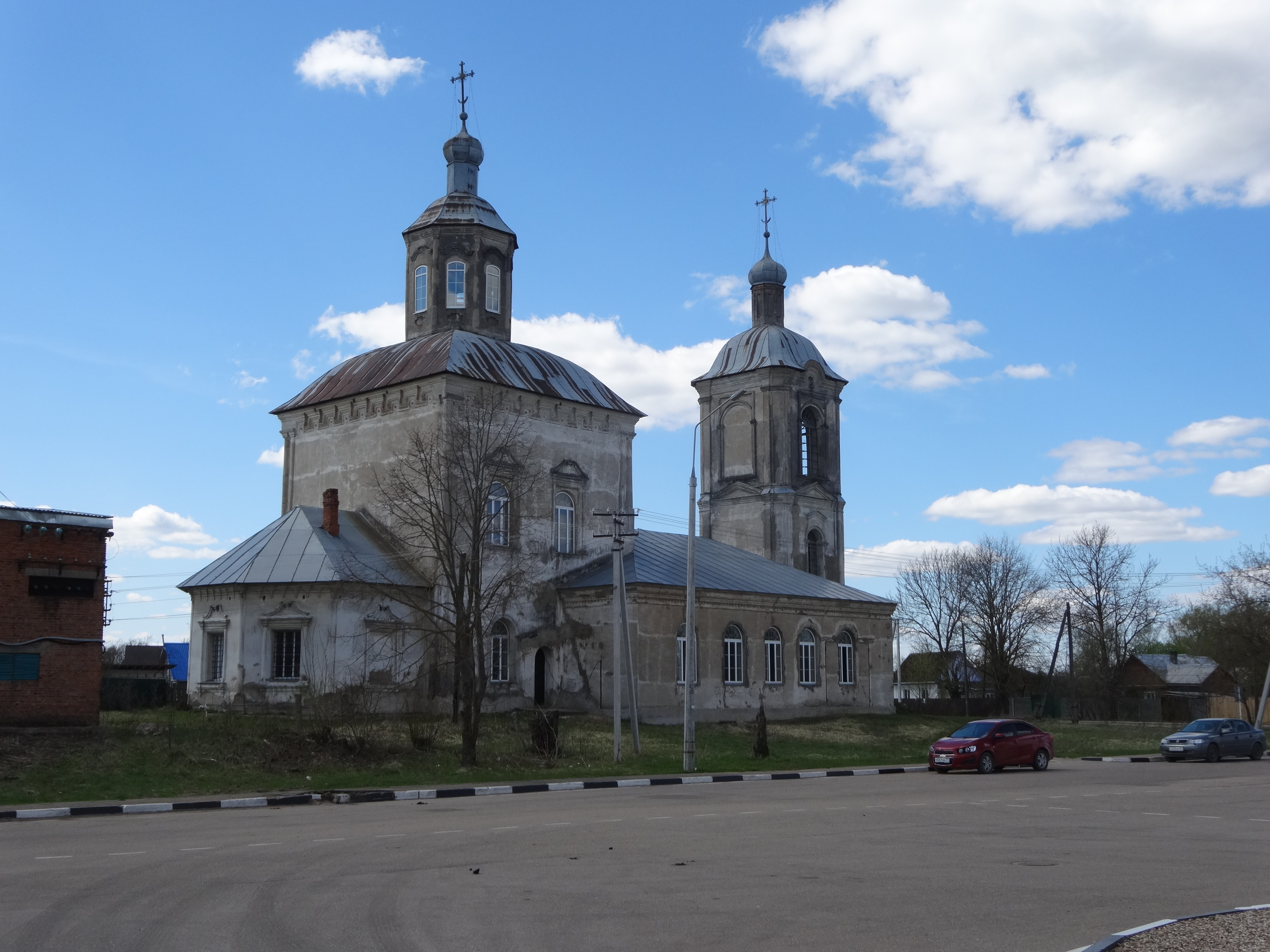 Церковь Рождества Христова (Ямская): улица Карла Маркса, Вязьма, Вяземский район, Смоленская область